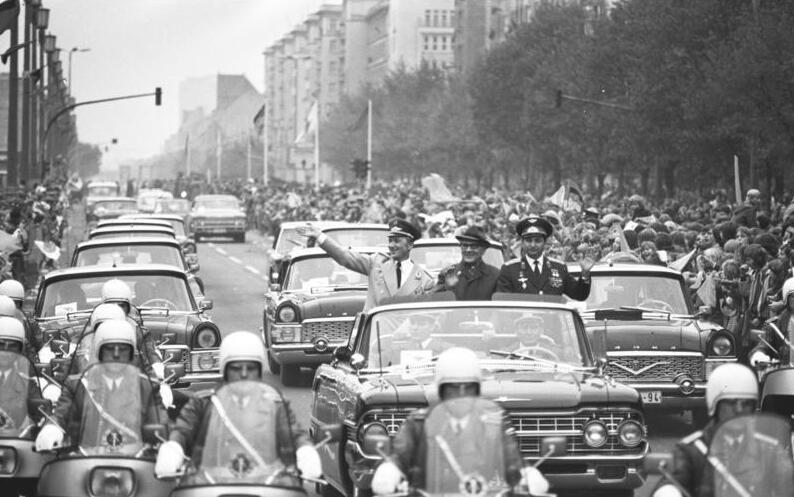 ADN-ZB/Koard/21.9.78 Kosmonauten Berlin: Spalier Der Konvoi mit den beiden Kosmonauten Sigmund Jähn (l.) und Waleri Bykowski (rechts), die am 21.9.1978 in Berlin eingetroffen waren, führt auf dem gesamten Weg vom Flughafen zum Stadtzentrum durch ein dichtes Spalier jubelnder Menschen. Sie wurden auf ihrer triumphalen Fahrt vom Generalsekretär des ZK der SED und Vorsitzenden des Staatsrates, Erich Honecker (Mitte) begleitet.